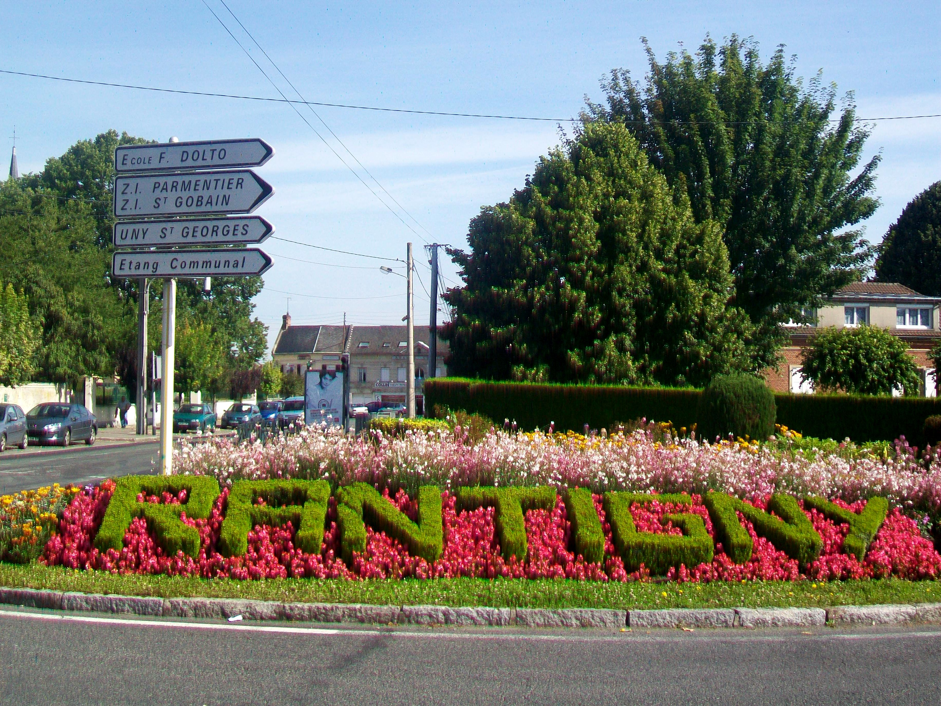 Le rond-point au carrefour avenue Jean-Jaurès / rue de la Passerelle : le nom de la commune en fleurs.